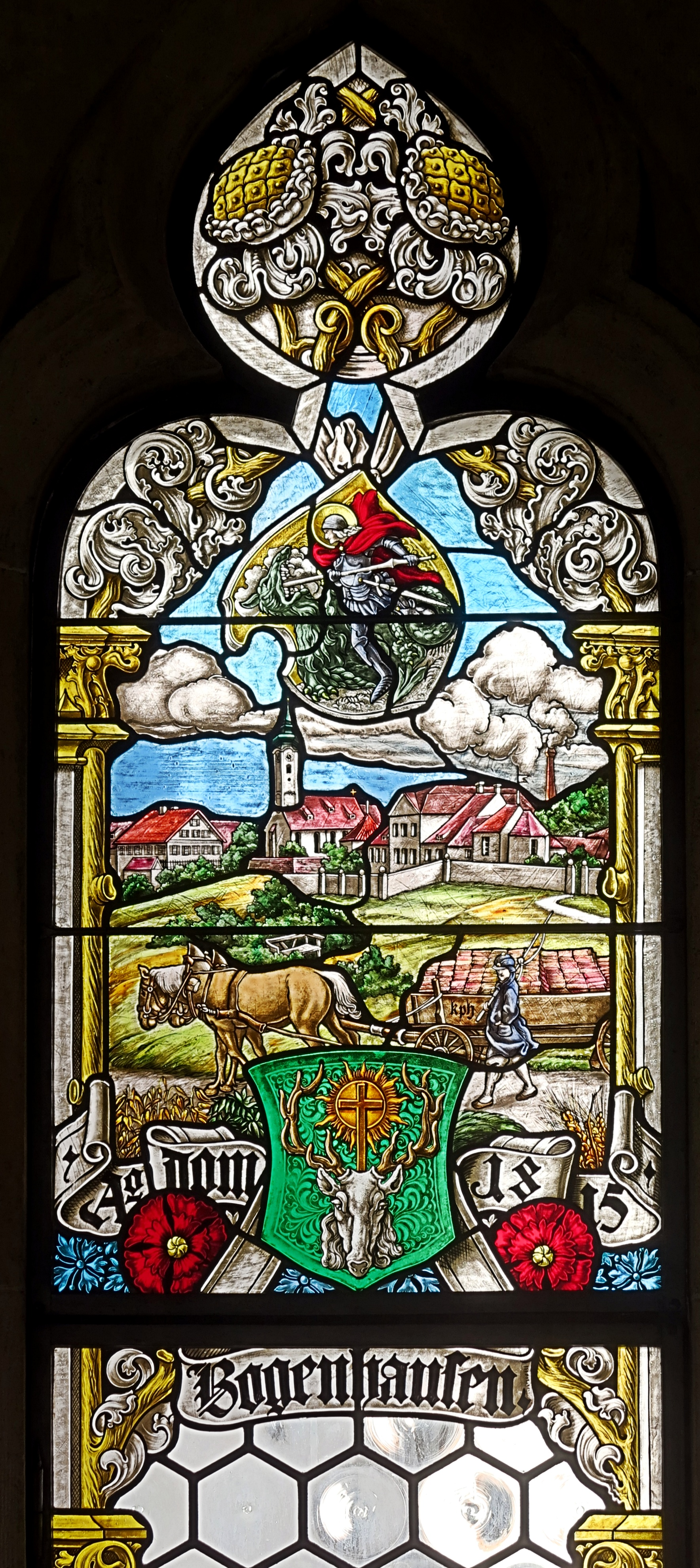 Deutschland, Bayern, München, Glasfenster im Münchner Neuen Rathaus, darstellend den Stadtteil Bogenhausen